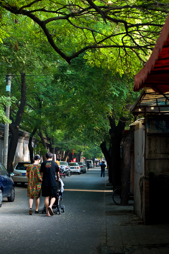 北京的胡同4--爵士鼓手